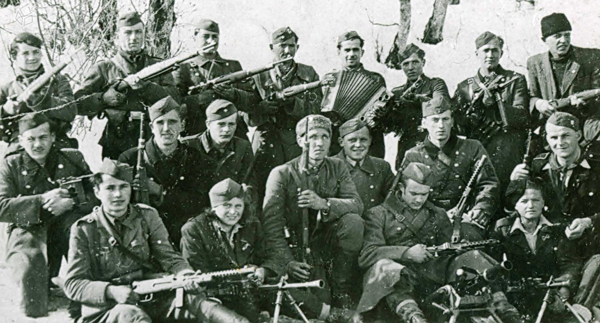 Slika prikazuje borce Šlandrove brigade na Menini planini novembra 1943.